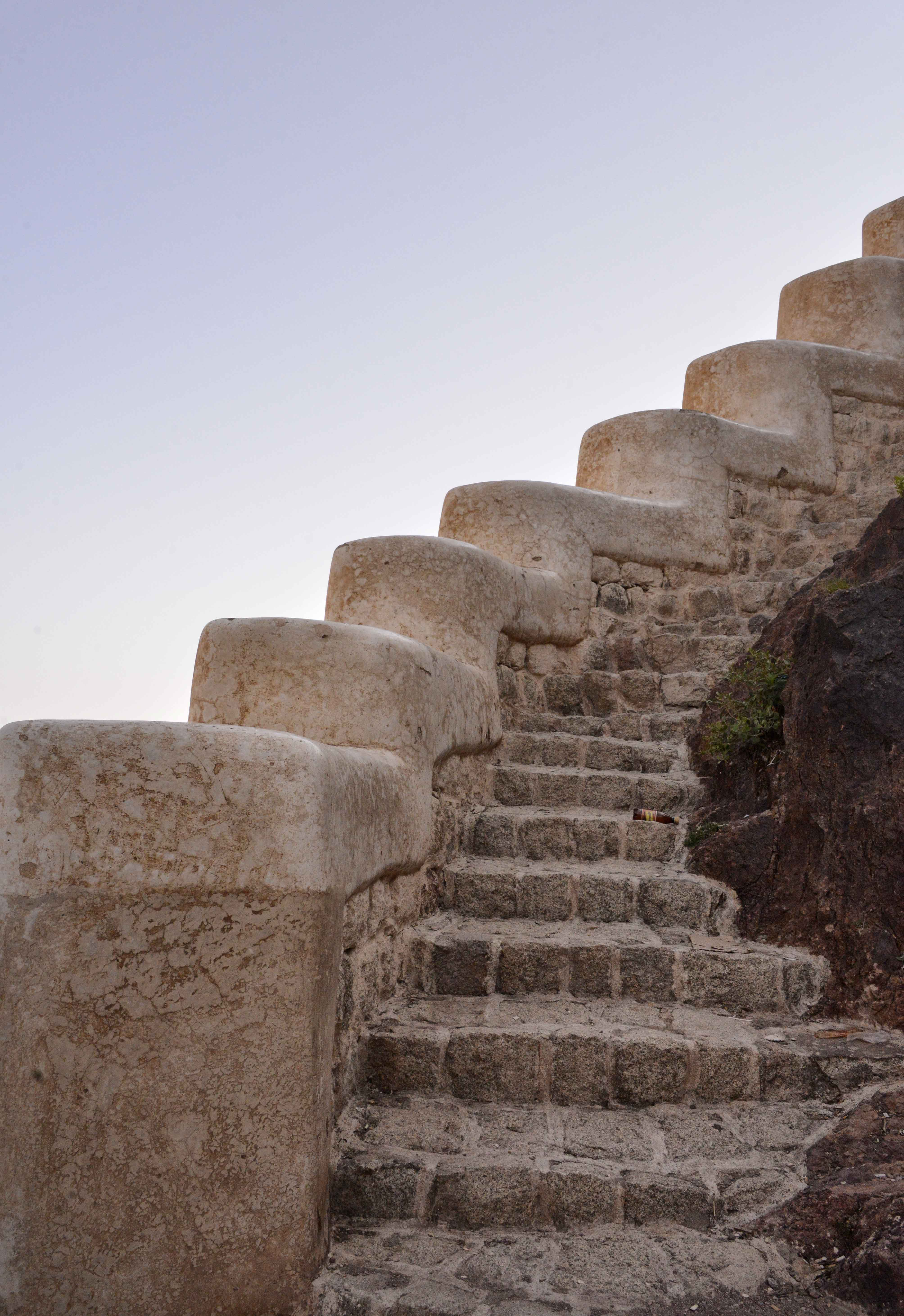 Steps, Yemen